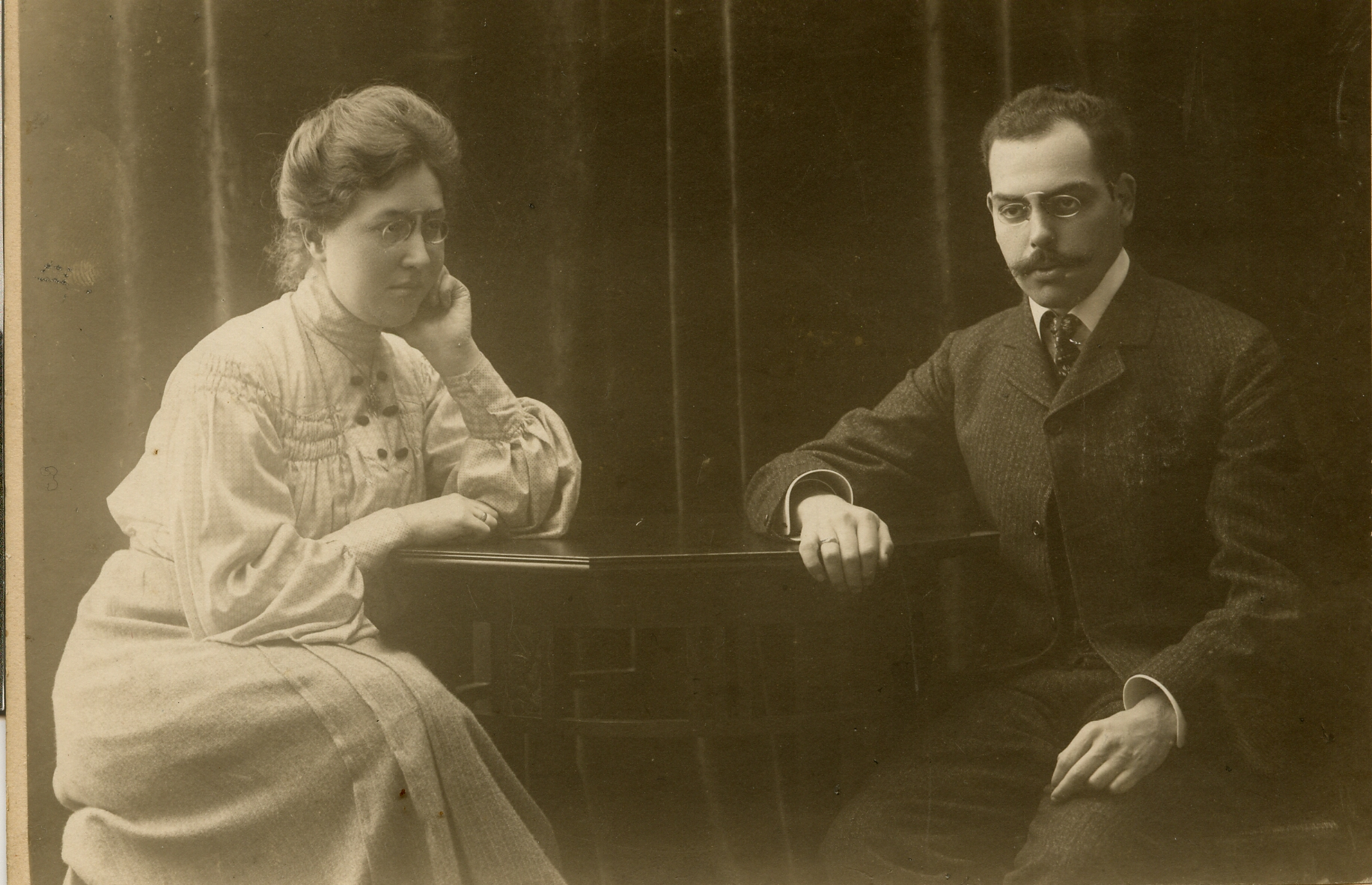 Hochzeitsbild von Rudolf und Margarete Hilferding, aufgenommen 1904